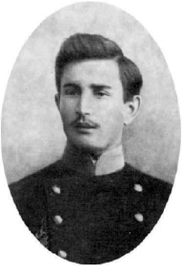 Леонид Афанасьевич Спендиаров (2 (14) мая 1869, Большая Каховка — 17 (29) августа 1897, Санкт-Петербург) — российский геолог, именем которого названа названа «Премия Спендиарова»